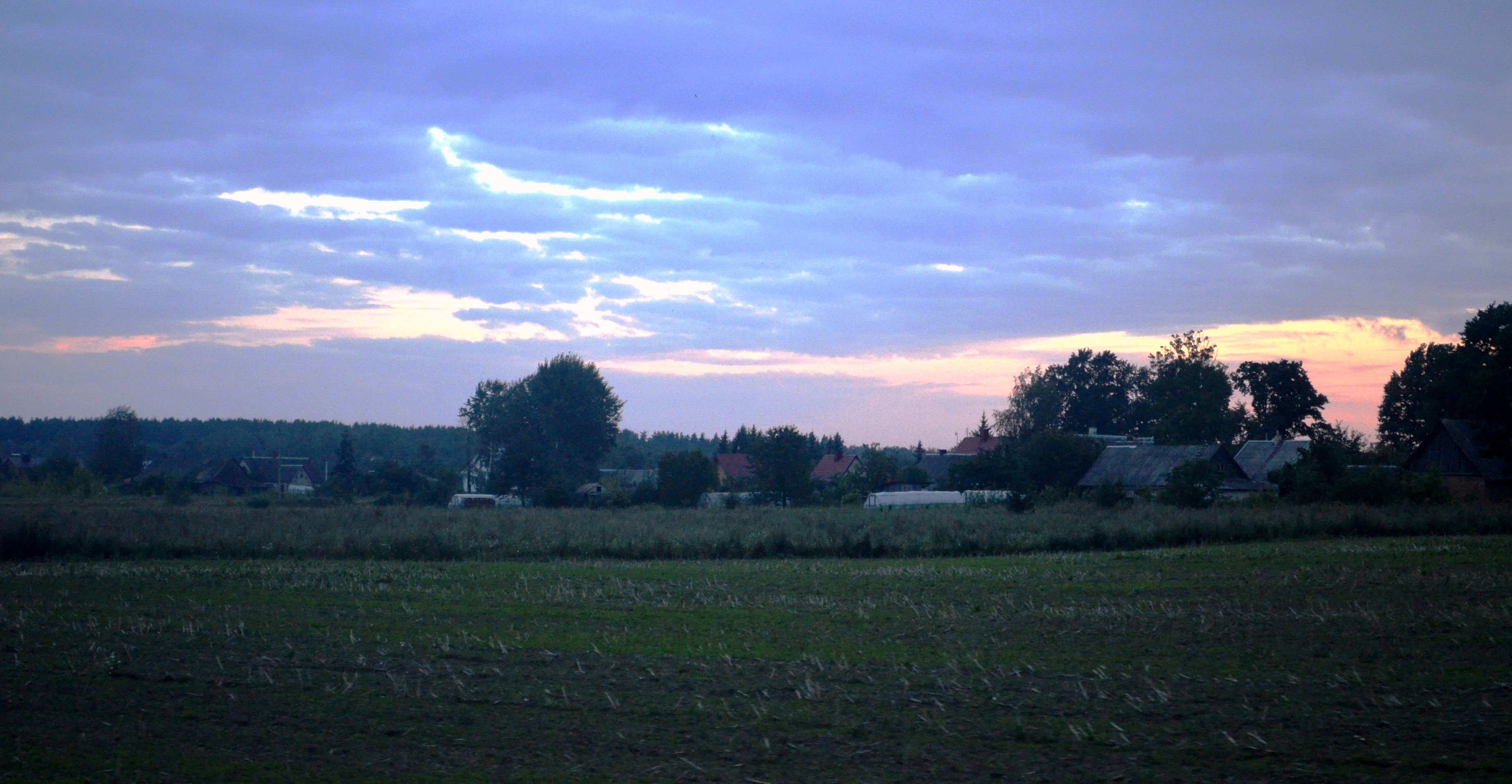 Ūta, Panevėžio raj.